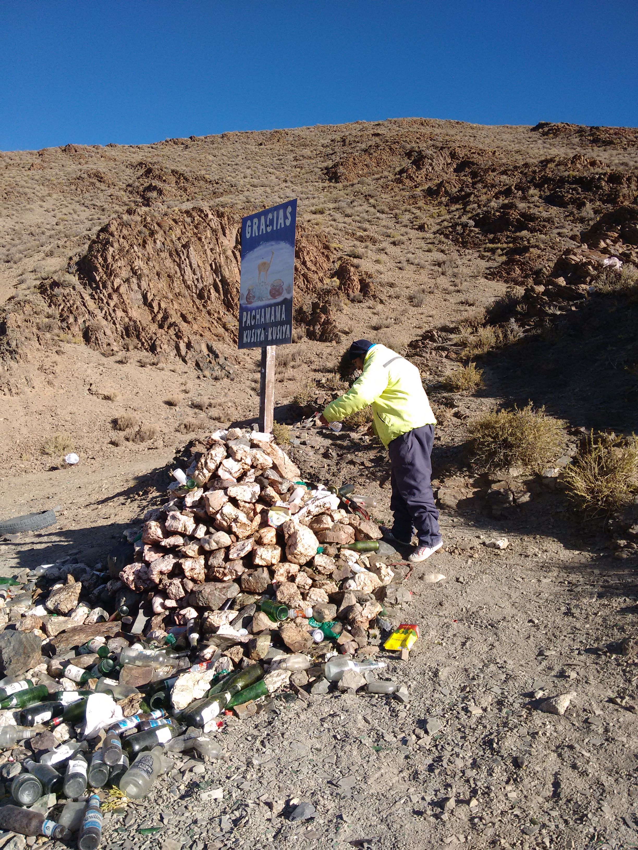 monumento cultural. lugares